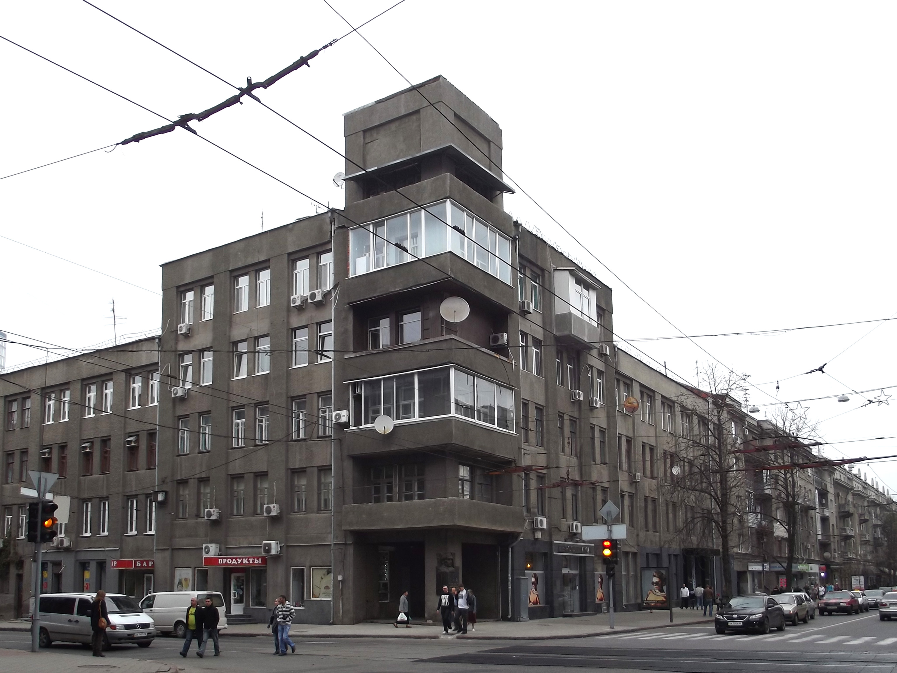 В этом доме жил В. К. Блюхер